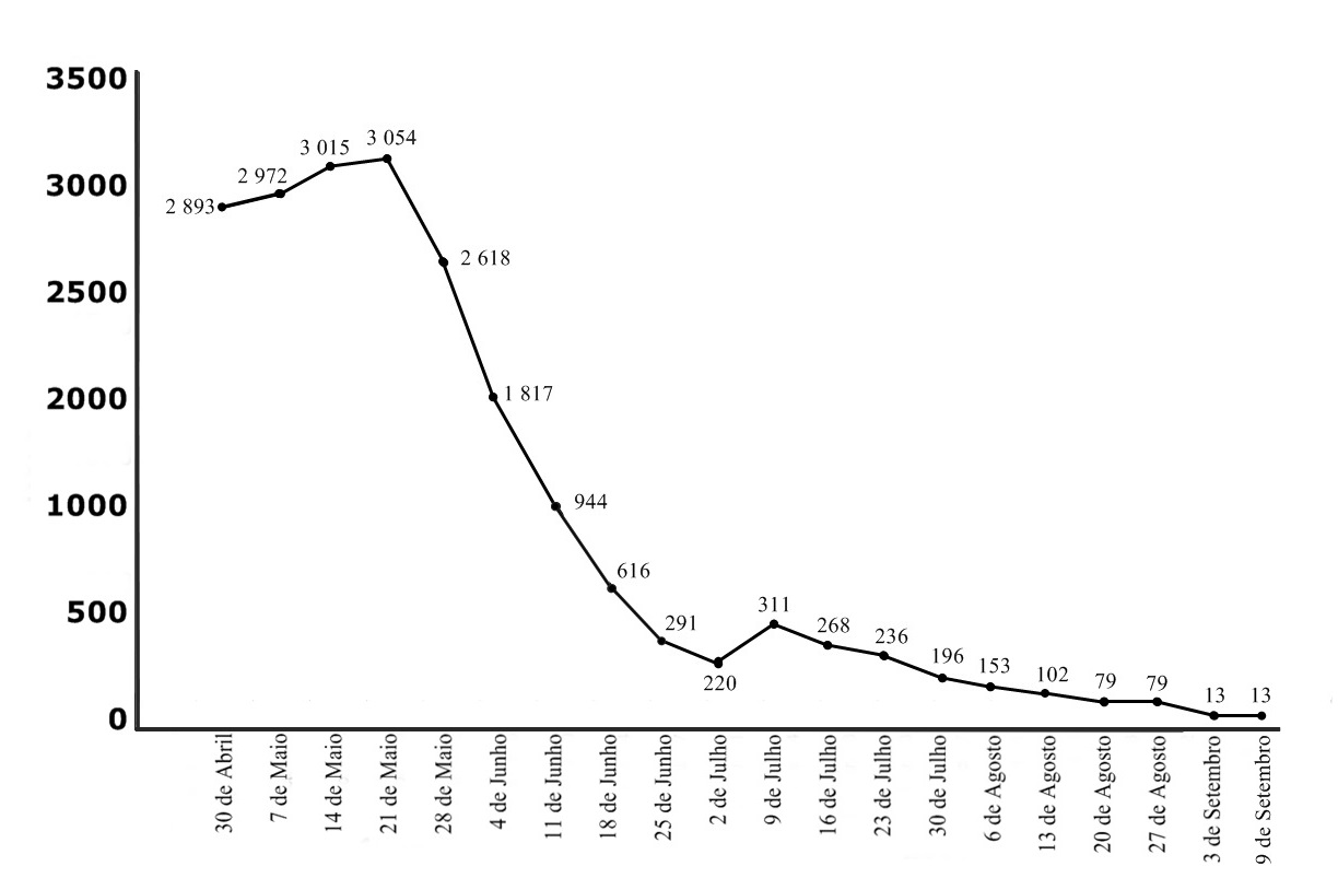 Gráfico a mostrar o número de cinemas em que Mean Girls foi exibido entre 30 de abril e 9 de setembro de 2004 (Fonte das informações: Box Office Mojo; fonte da imagem: American Beauty Theater Count).